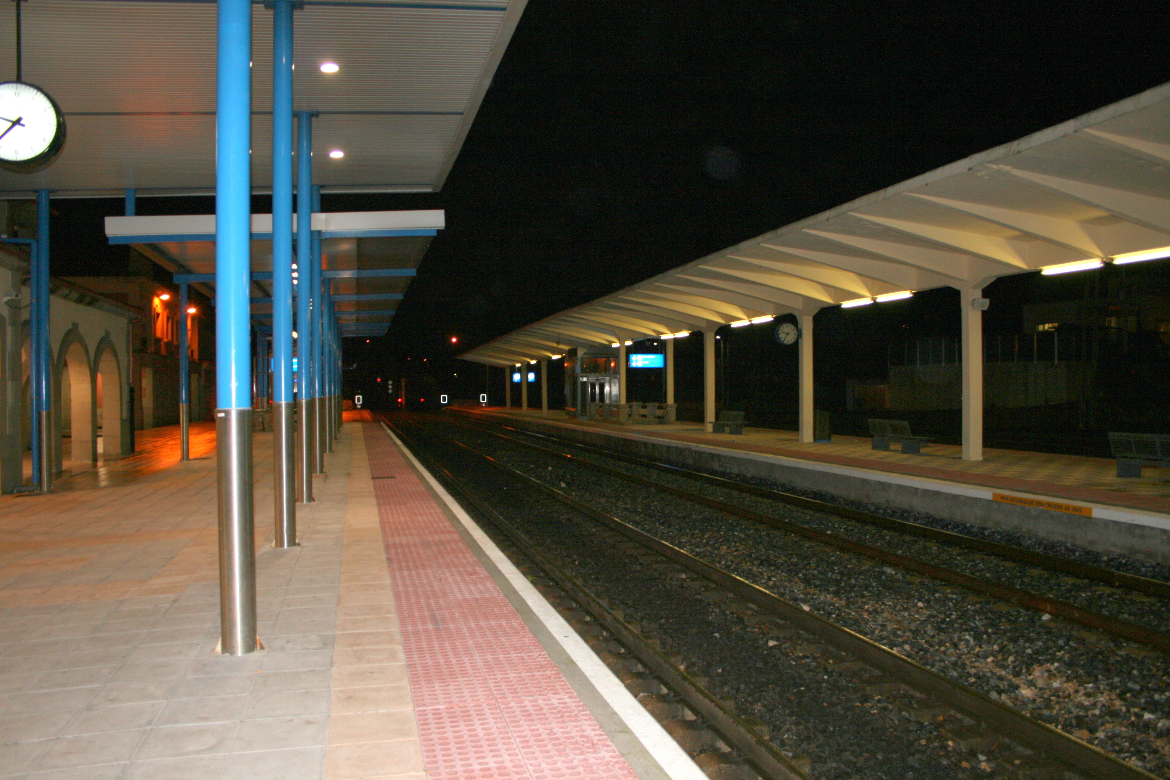 Andenes de la estación de Villagarcía de Arosa de noche